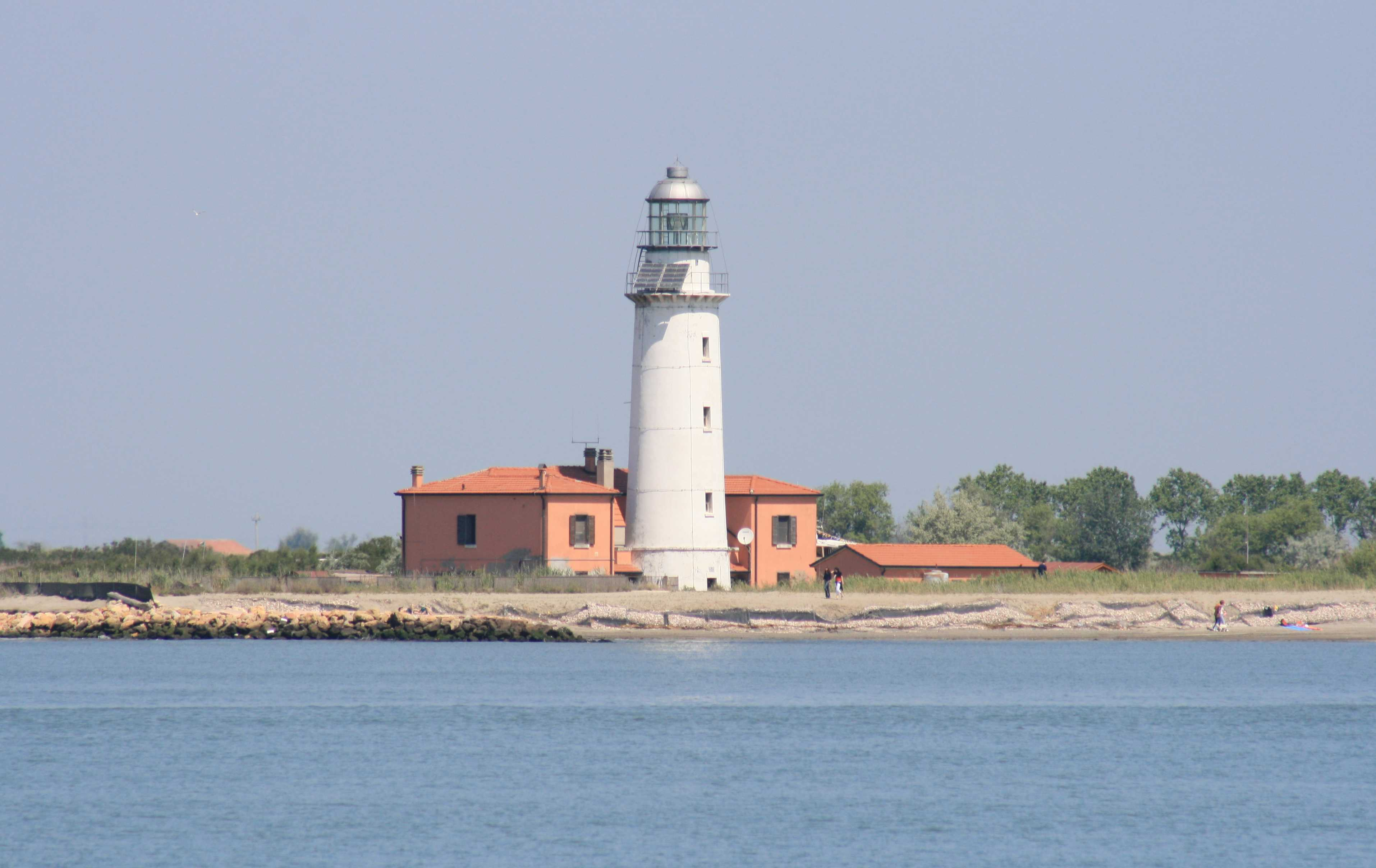 Faro di Goro